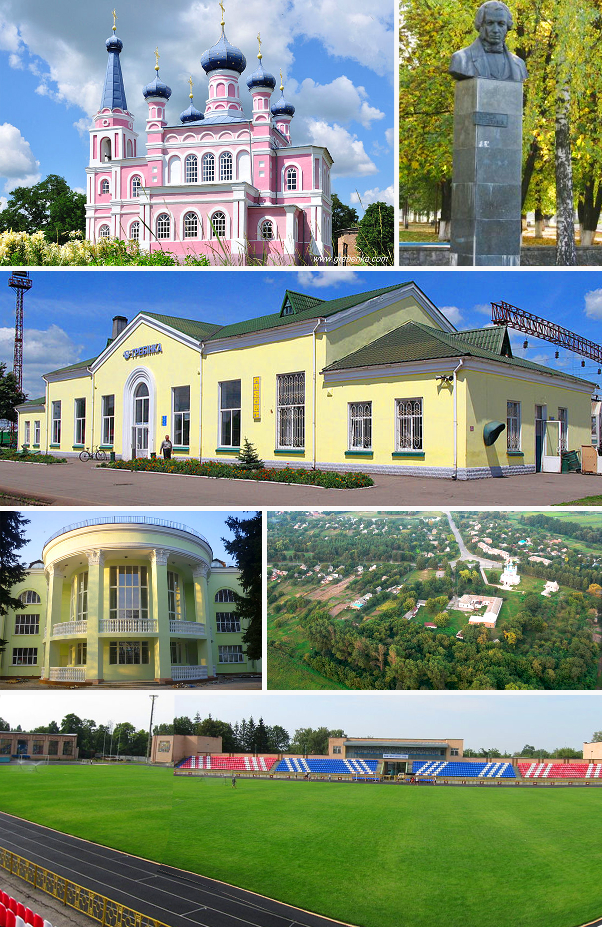 За годинниковою стрілкою знизу: стадіон Центральний, районний Будинок культури, будівля залізничного вокзалу, церква святого Георгія, погруддя Є.Гребінці, знімок міста з висоти.